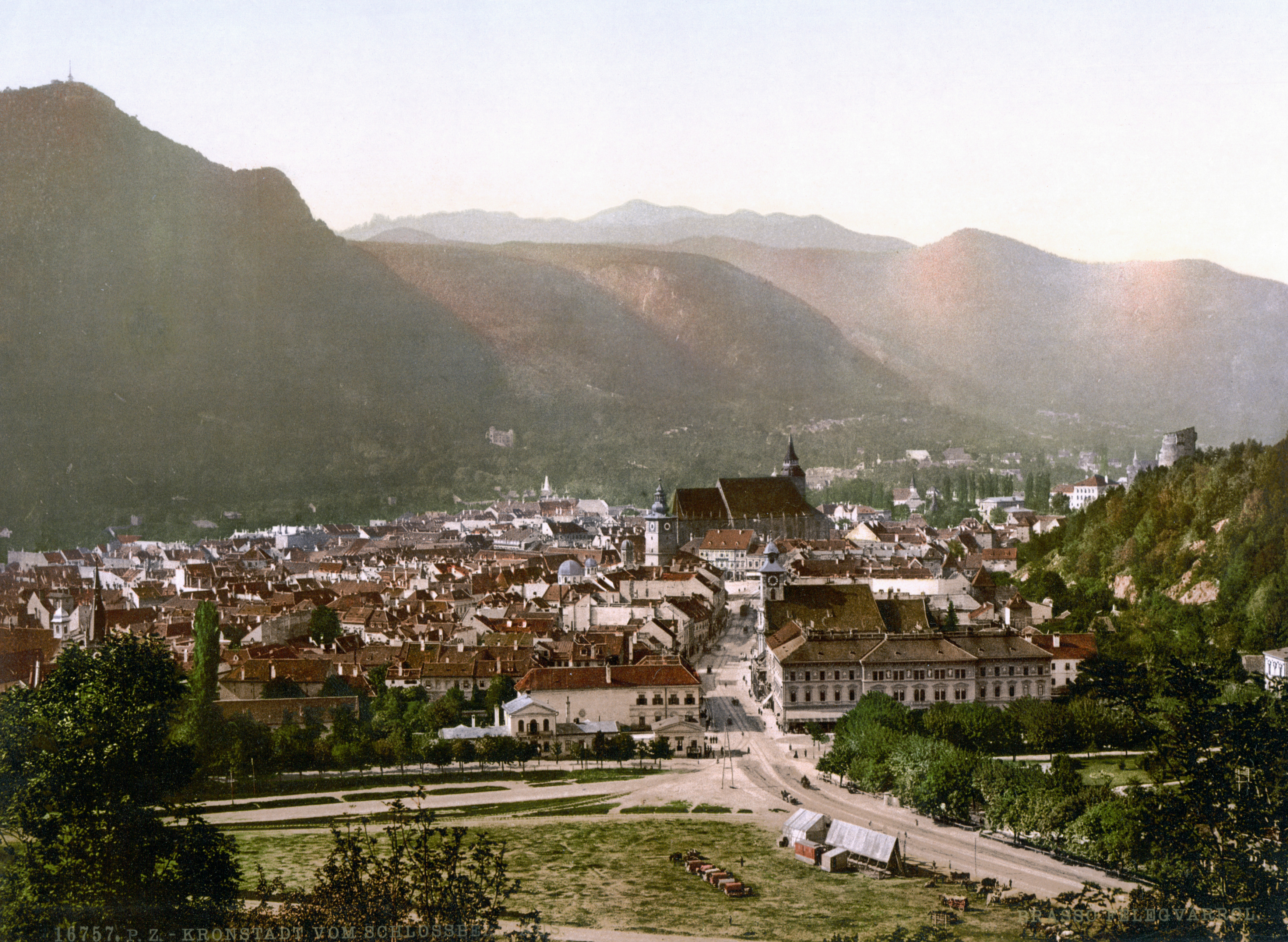 Kronstadt um 1900